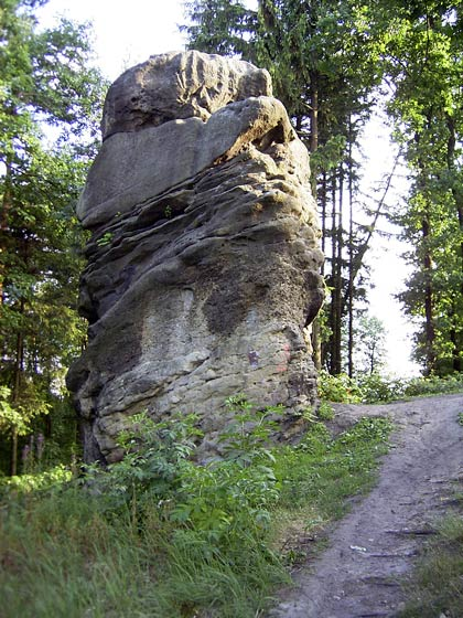 Skalní útvar Jarcovská kula, katastr obce Jarcová.